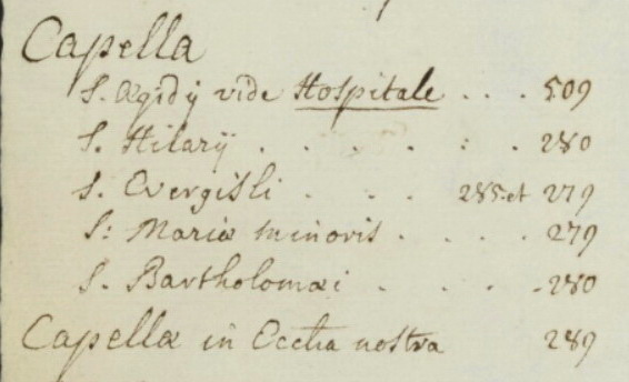 Pagina uit Compendium prothocollorum ab anno 1400, het repertorium van resoluties van het Onze-Lieve-Vrouwekapittel in Maastricht, van 1400 tot ca .1776. Collectie RHCL Maastricht, archief van het kapittel van Onze Lieve Vrouw te Maastricht, inv.nr. 14.B001 - 28-29.